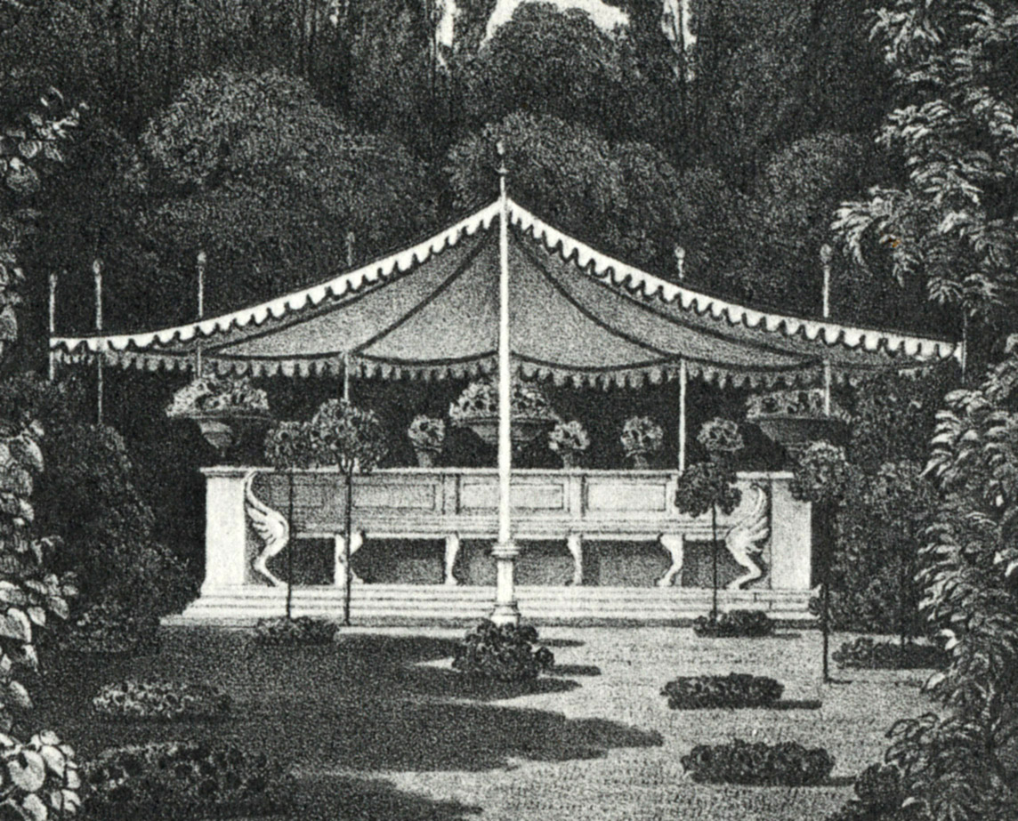 Antike Bank im Muskauer Park